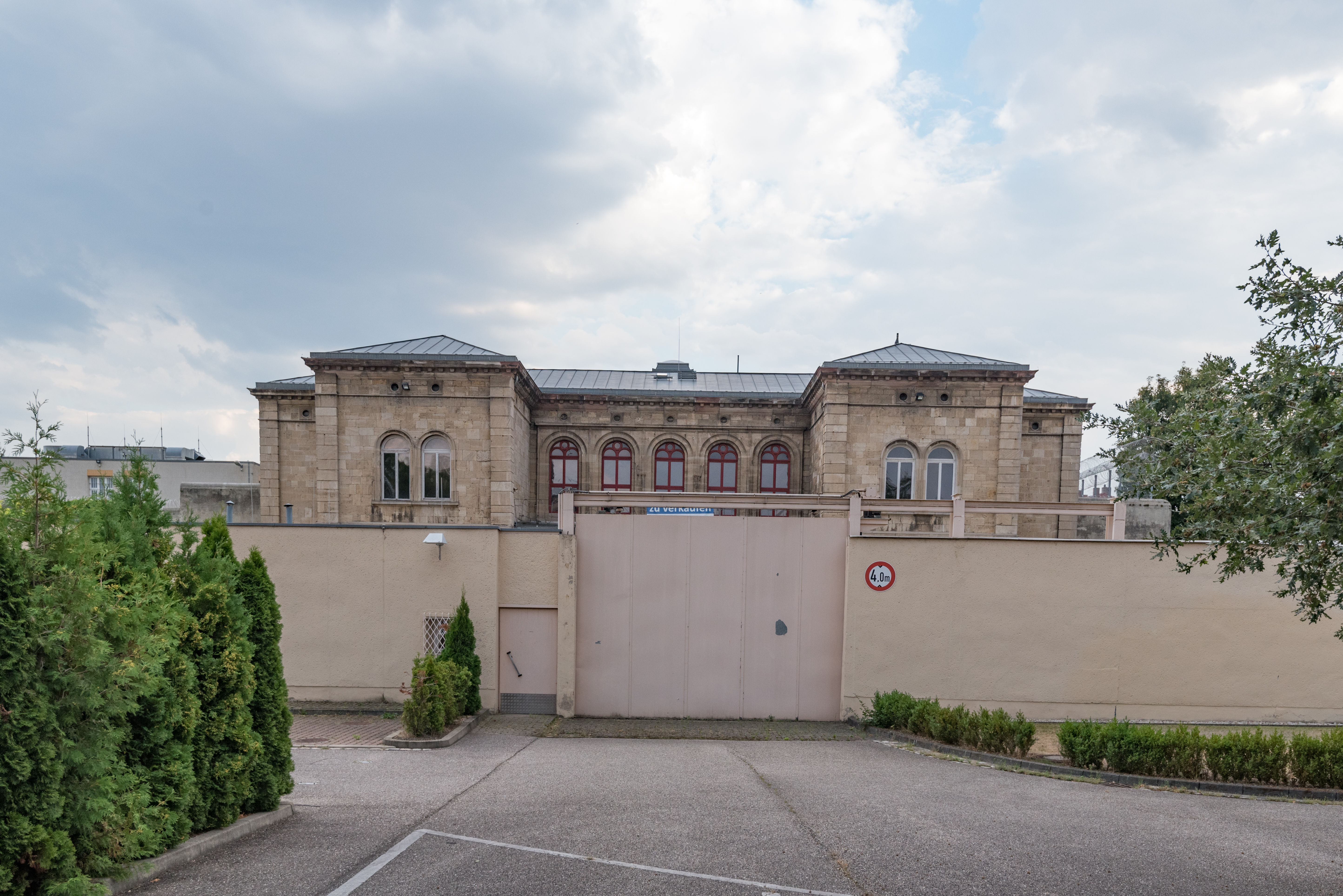 Naumburg (Saale), Am Salztor 5